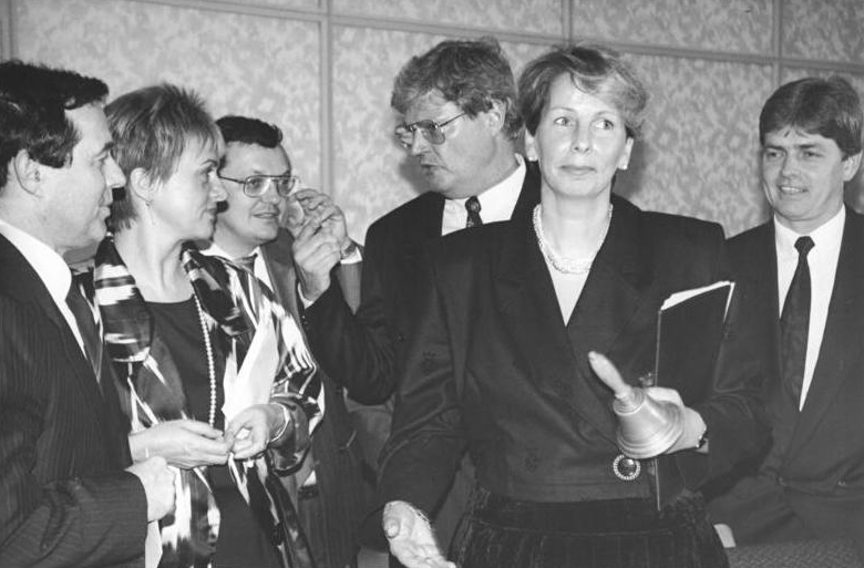 ADN-Hubert Link-2.10.90 Berlin: Volkskammer-Tagung. Mit einer Sitzung der Volkskammer wurden am späten Dienstagnachmittag die letzten Stunden der DDR eingeläutet. Dr. Sabine Bergmann-Pohl, Präsidentin des Parlamentes, stellte fest, daß die Volkskammer nun ihren Auftrag erfüllt habe, der ihr vor sieben Monaten von Wählern gegeben wurde. das erste freigewählte DDR-Parlament brachte es immerhin auf 164 Gesetze und 93 Beschlüsse, eine quantitative Bilanz, für die viele andere Parlamente Jahre brauchen.